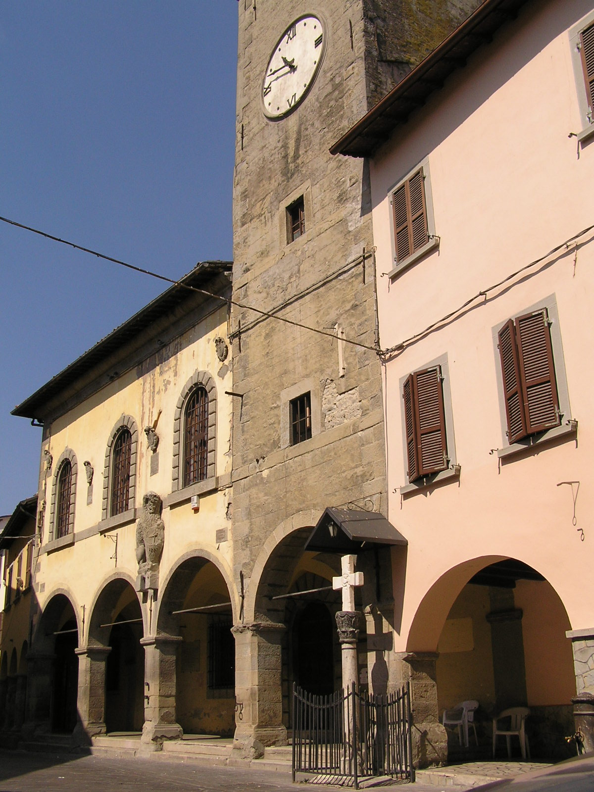 Palazzo del Podestà, in via Zanetti. Risalente al 1600 circa, in stile chiaramente toscano.